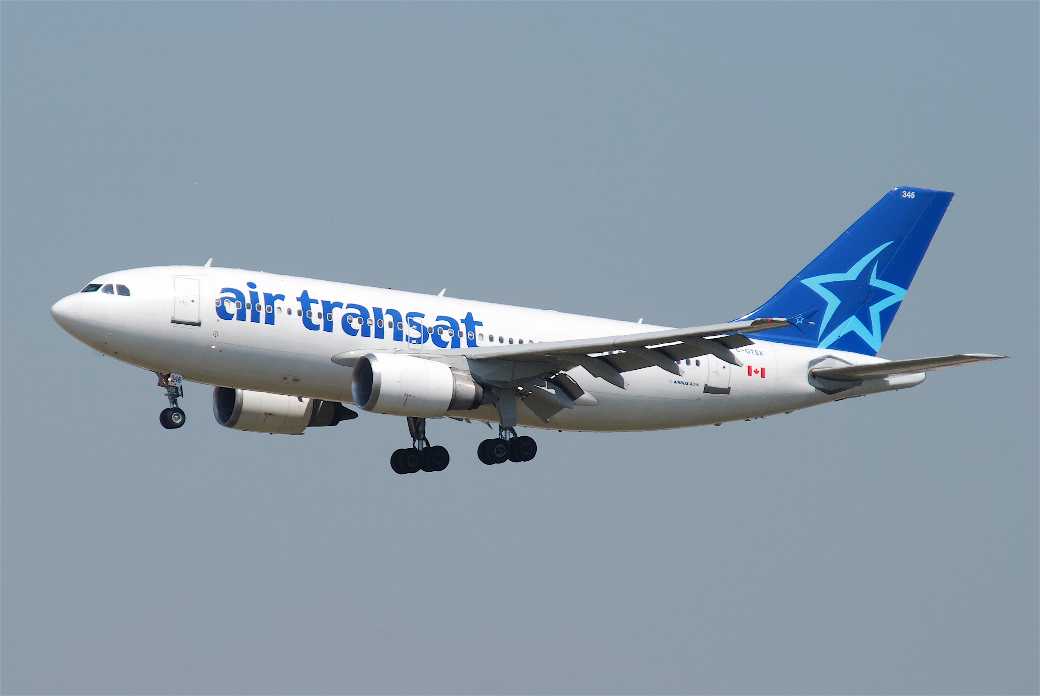 Air Transat Airbus A310; C-GTSX@FRA;09.07.2010/581gm